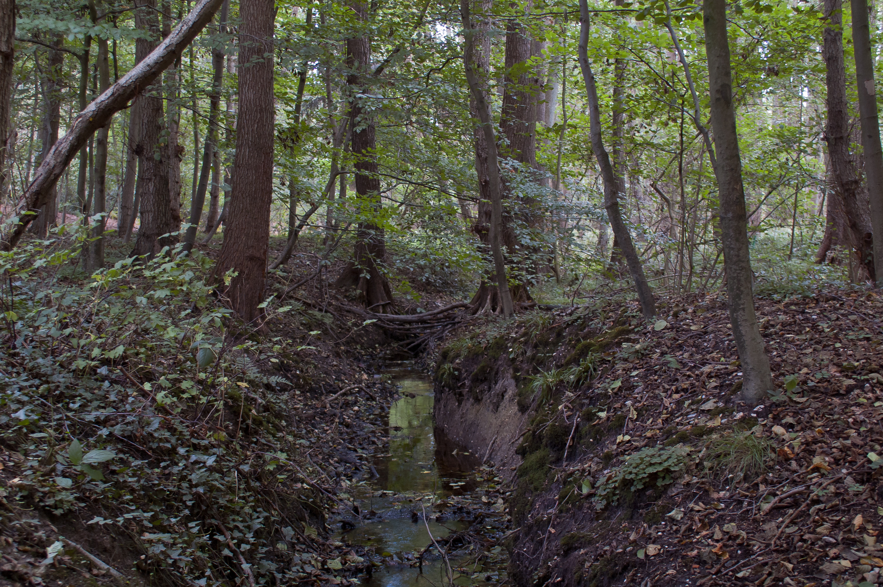 Der Birgeler Bach im Bruch unterhalb des Birgeler Pützchens zwischen Birgelen und Wassenberg